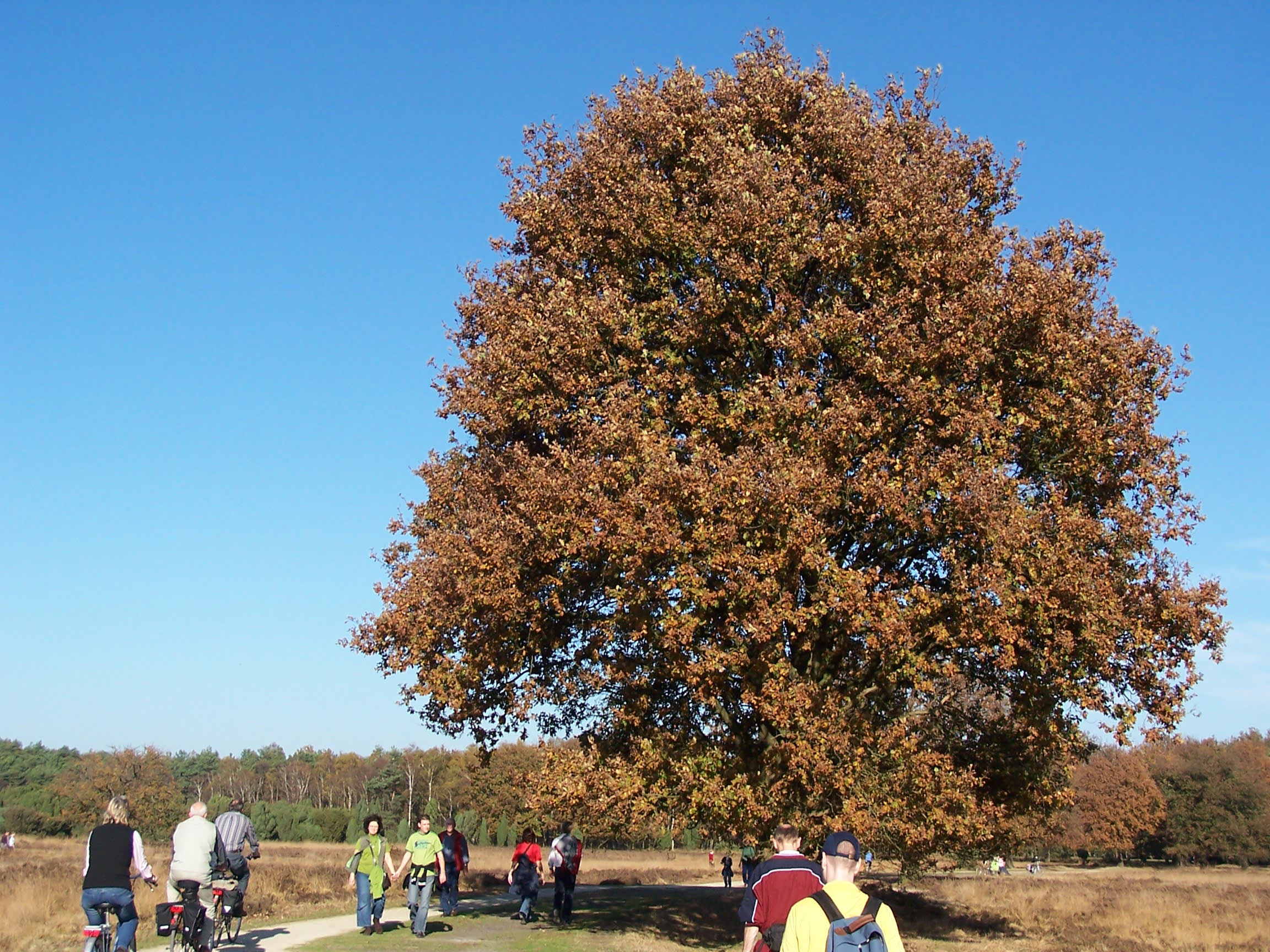 Autumn tree in Buurserzand (near Haaksbergen and Enschede, Netherlands)